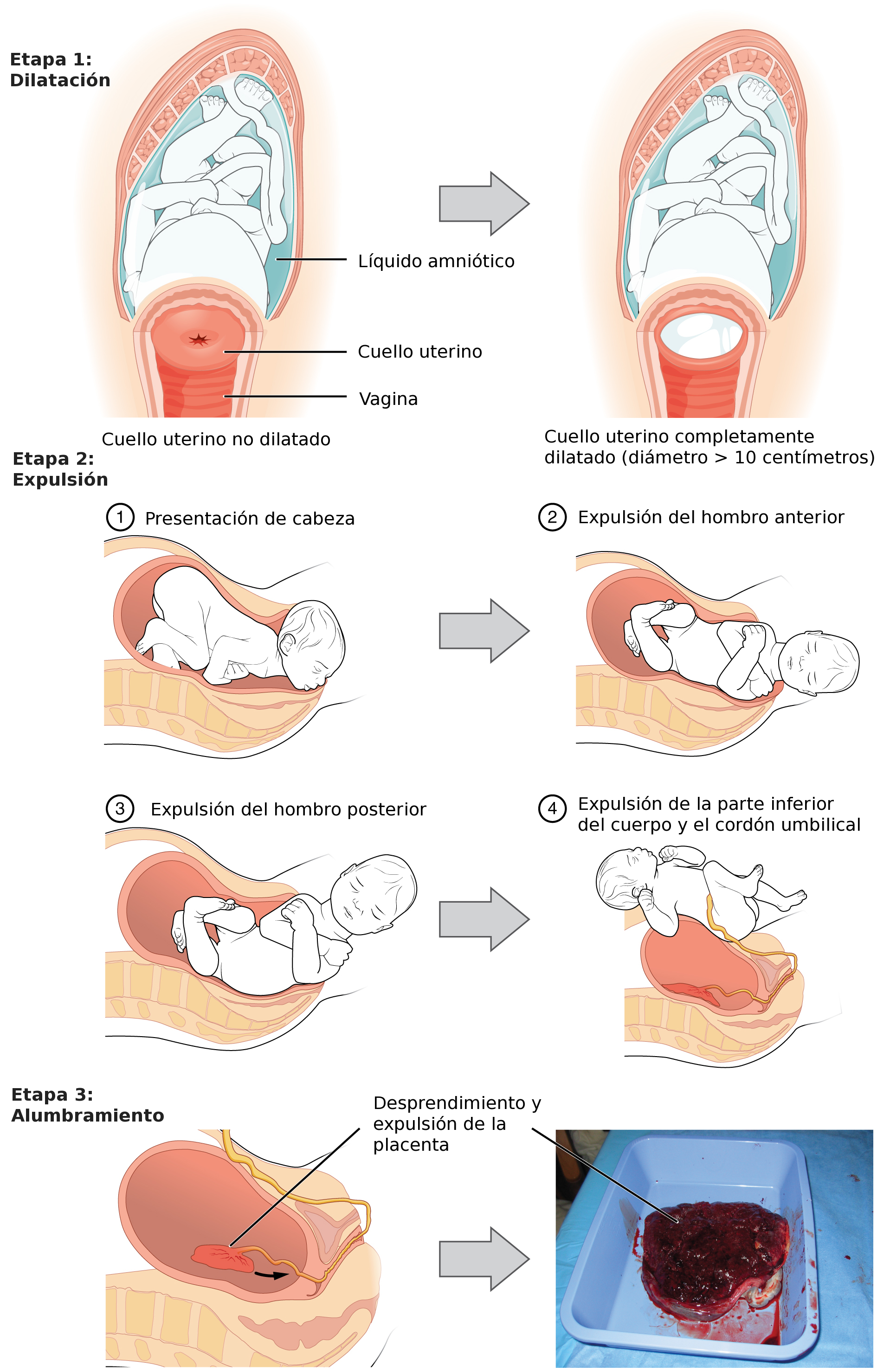 Ilustración de las etapas del parto. Anatomy & Physiology, texto traducido al español.